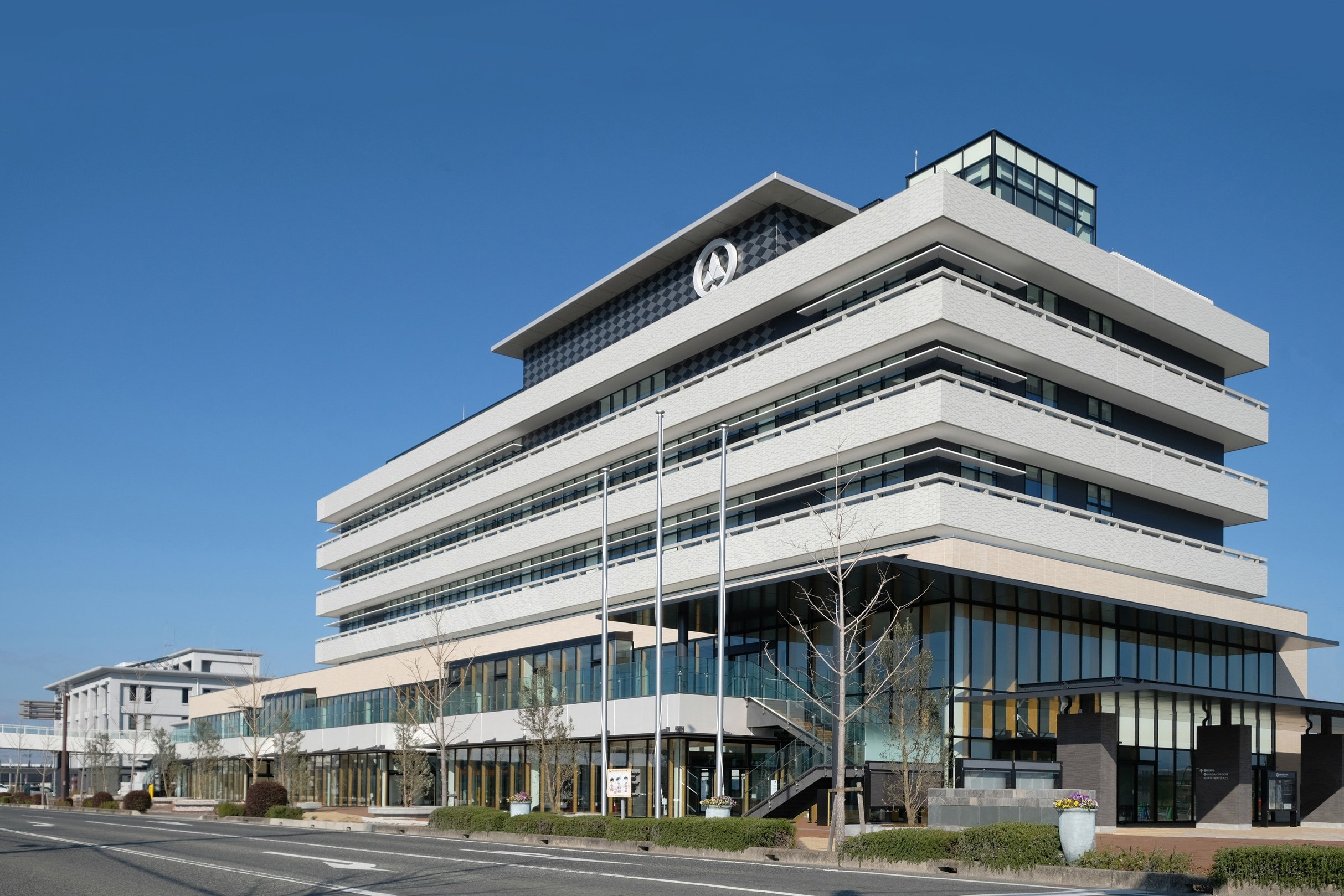 2020年5月に移転した小野市役所新庁舎